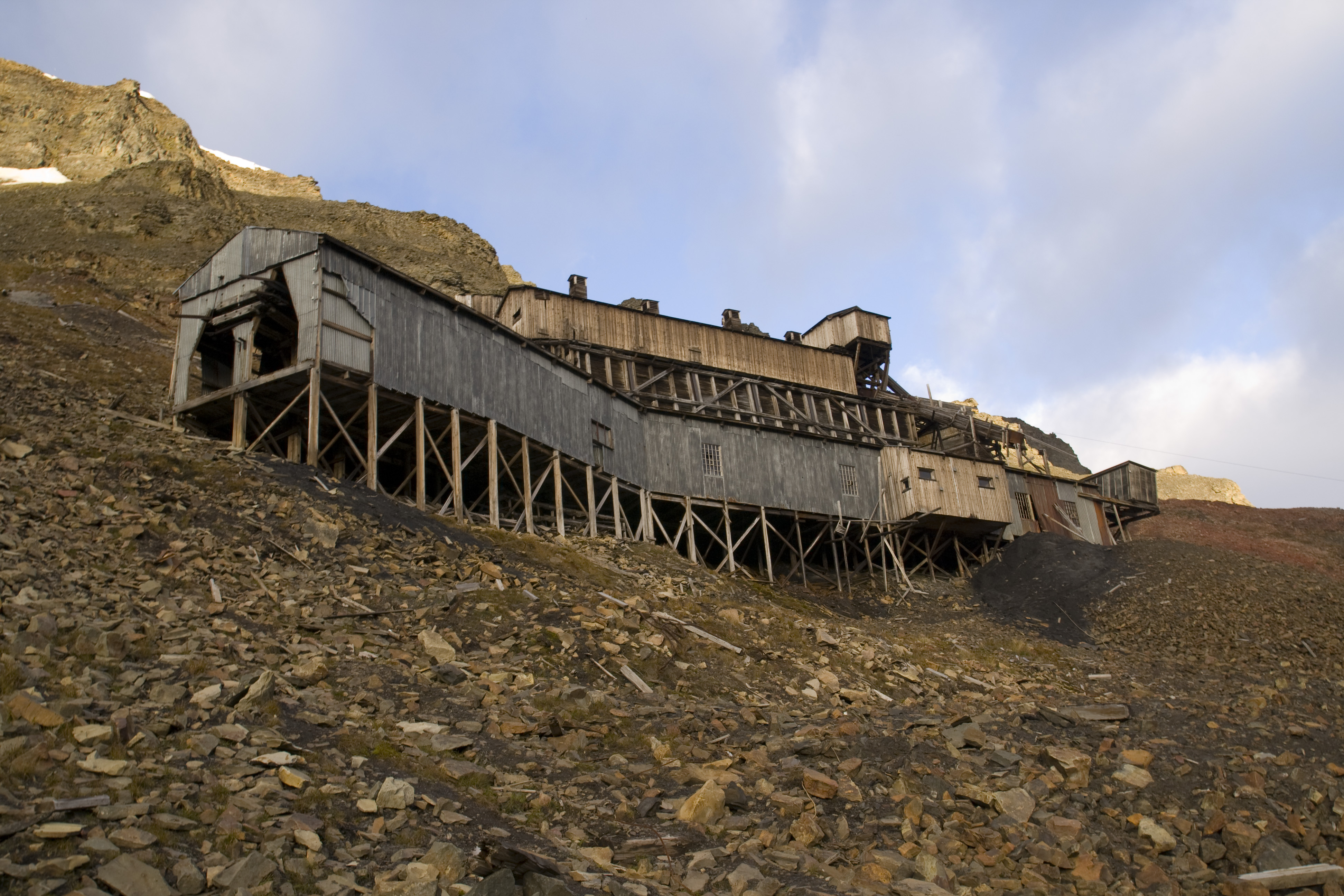 alte Kohlemine "Gruve 2", Longyearbyen, Svalbard